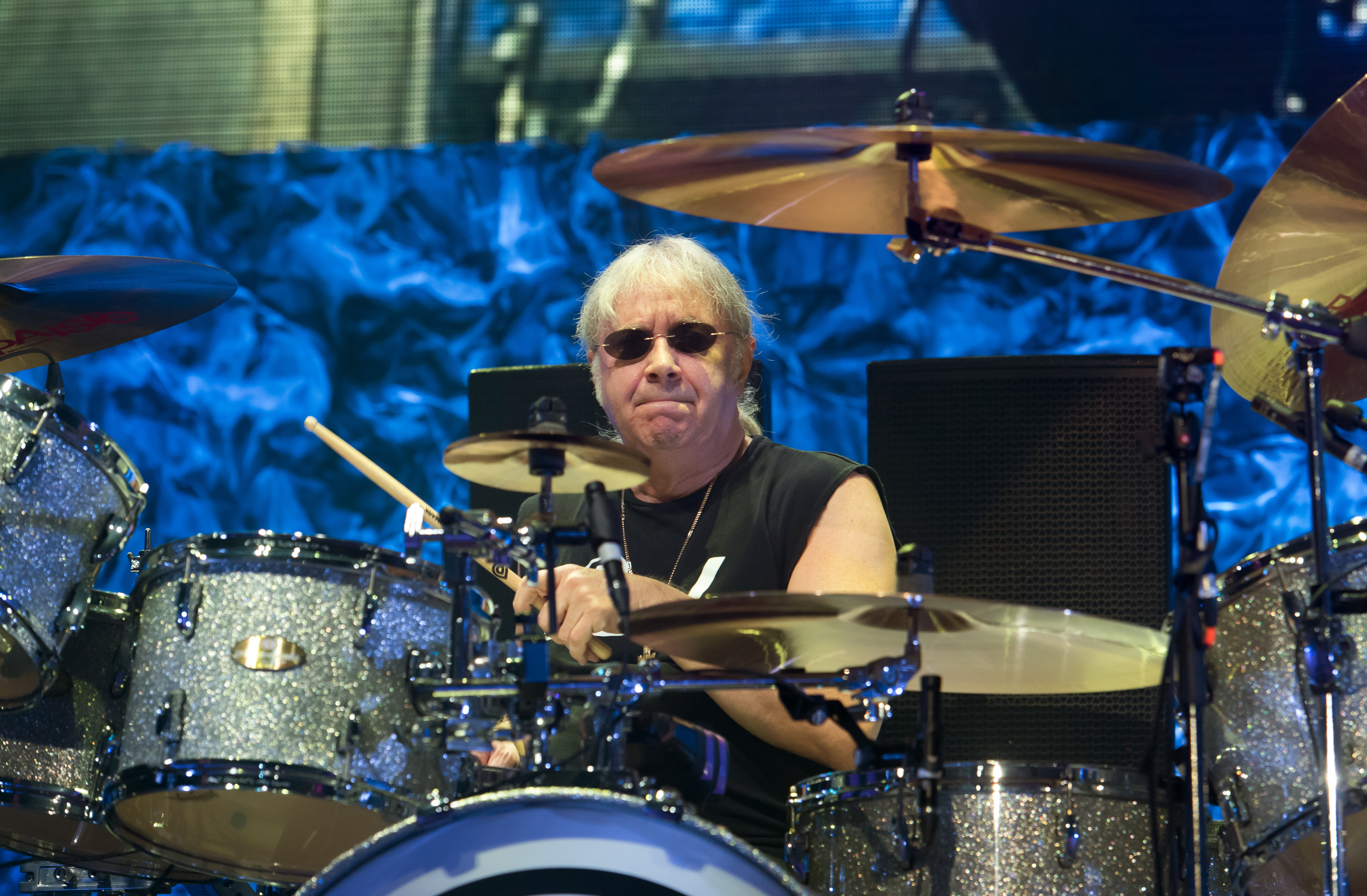 Ian Paice von Deep Purple bei der inFinite "The Long Goodbye Tour" in der Barclaycard Arena in Hamburg 2017